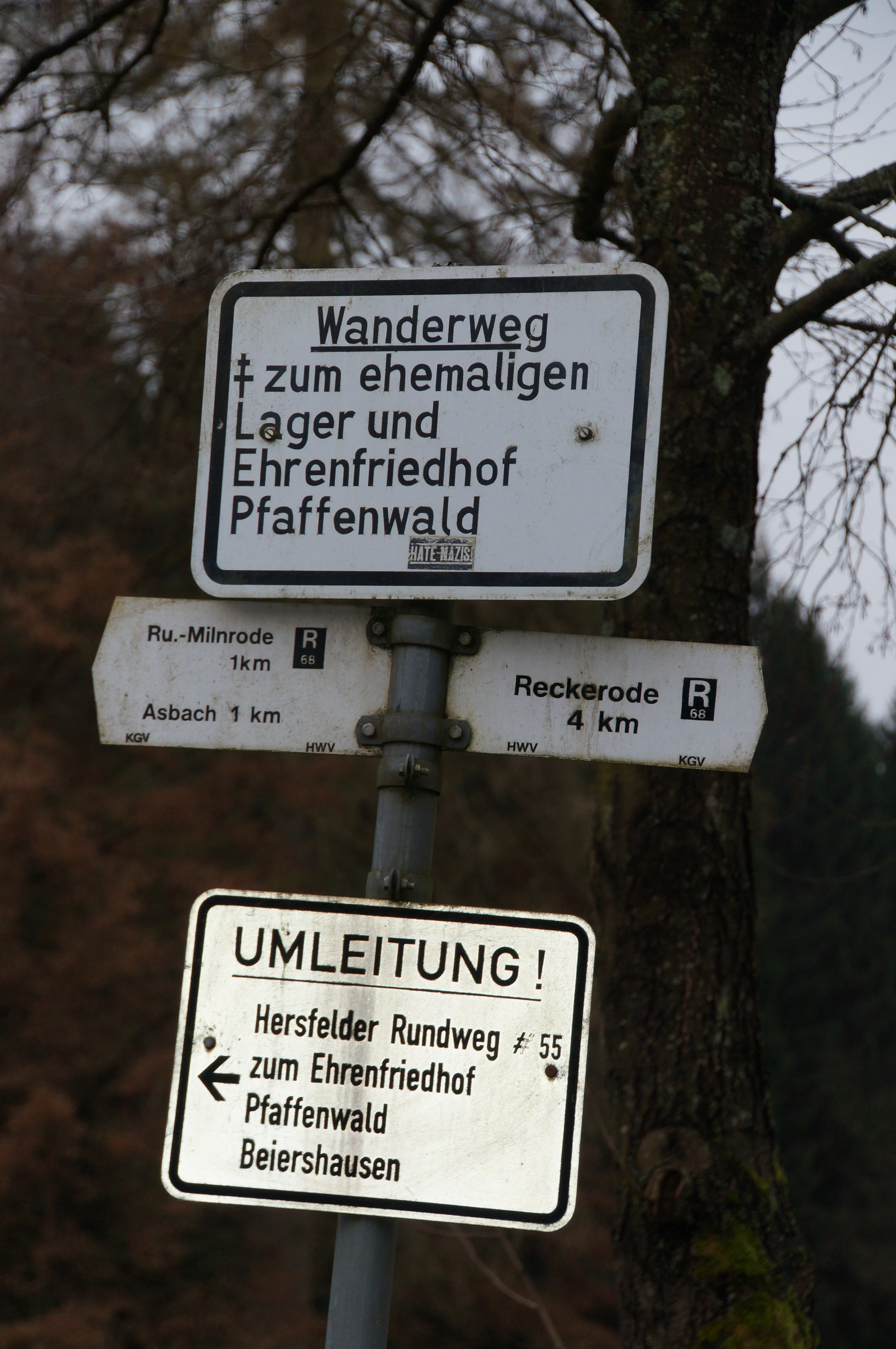 Wegweiser zum ehemaligen Zwangsarbeitslager Pfaffenwald und zum Waldfriedhof.